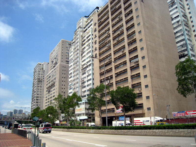 HK Tsuen Wan Chai Wan Kok Industrial Area 荃灣 柴灣角工業區